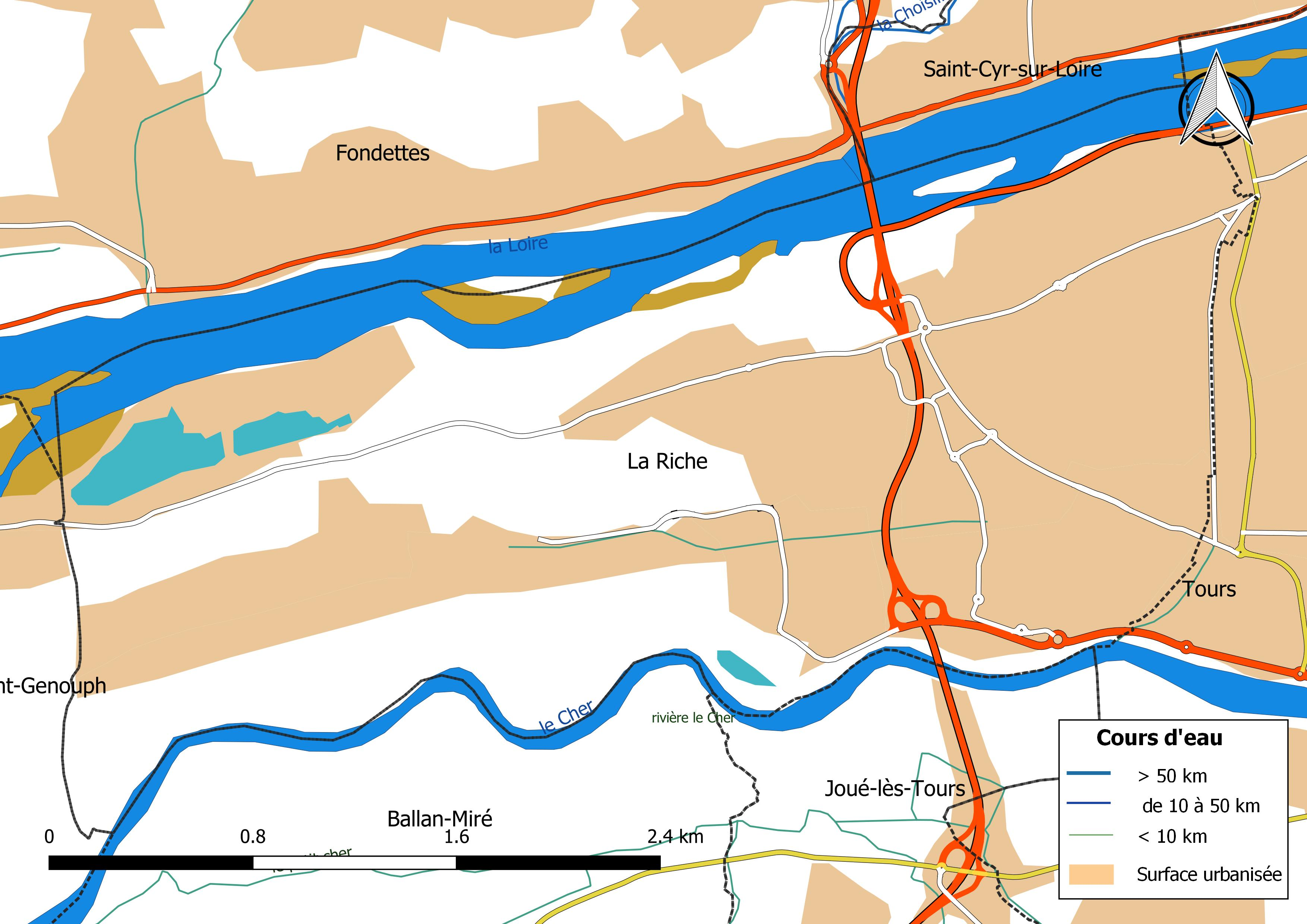 Carte du réseau hydrographique de la commune de La Riche (France).